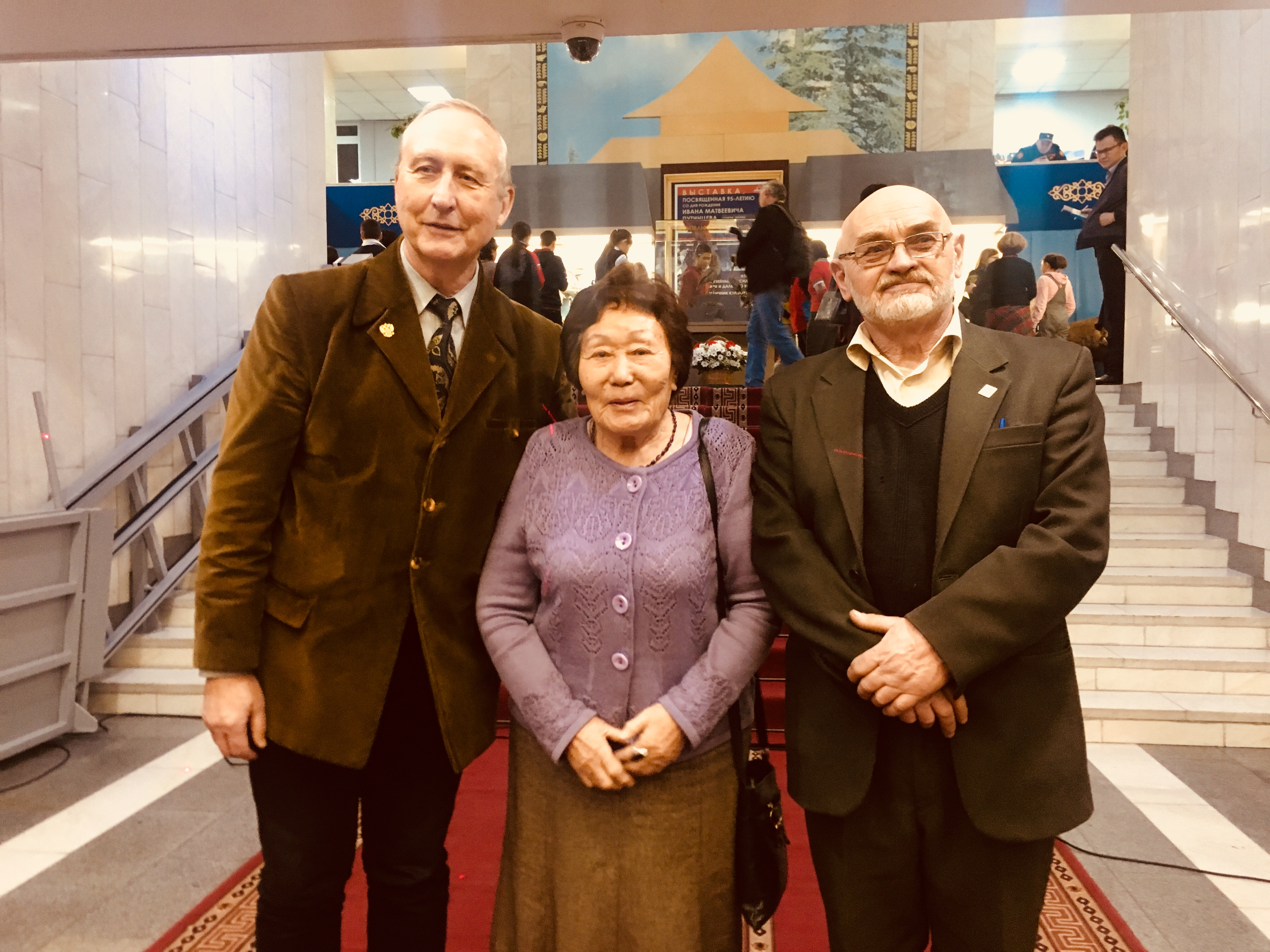 Тыва дыл: Светлана Суруновна Курбатская Тыва Республиканың национал музейинде Иван Матвеевич Путинцевтиң 95 харлаанынга тураскааткан делгелгеде Николай Иванович Путинцев болгаш Валентин Иванович Заика-биле.